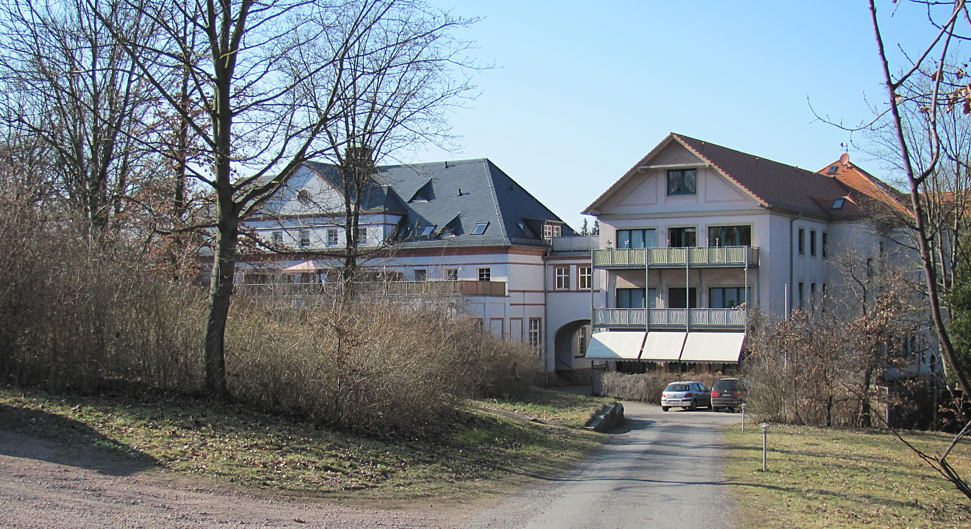 Radebeul, ehem. Kreispflegeheim Lößnitzhöhe